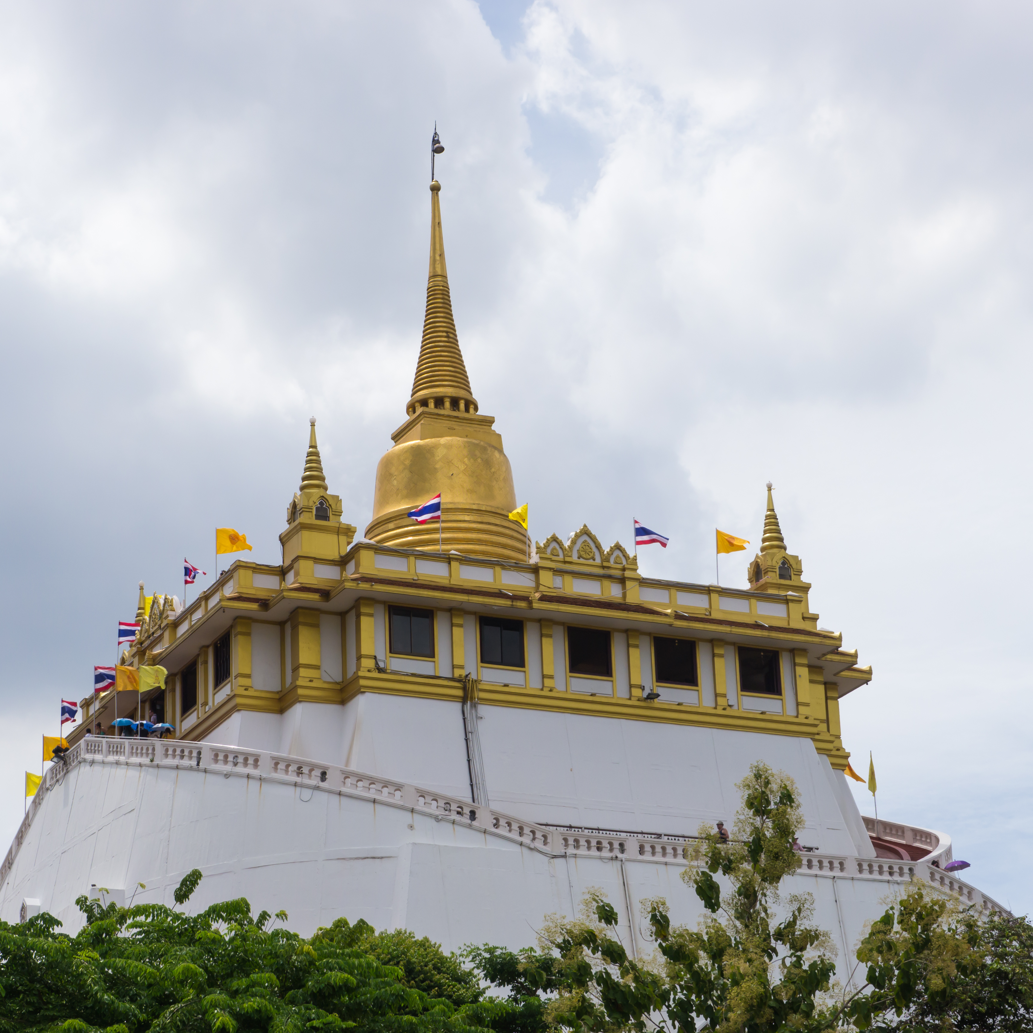 วัดสระเกศ